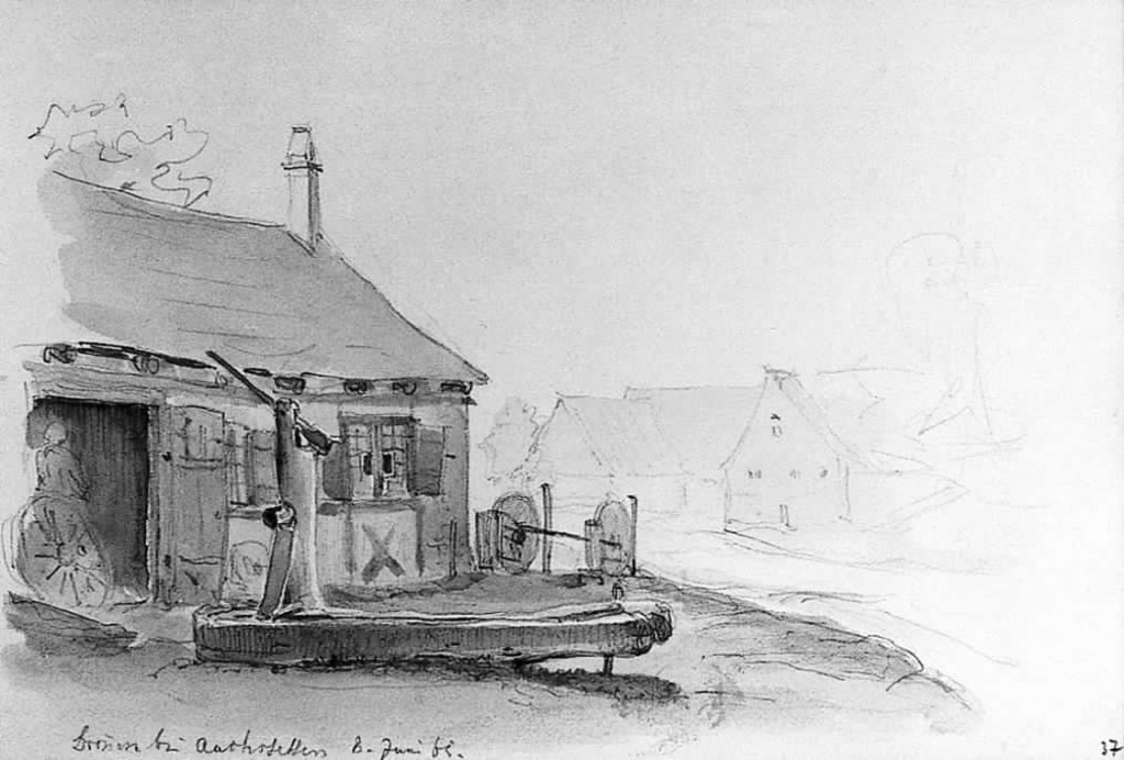 Achstetten, Bauernhaus mit Ziehbrunnen (nach Schefold 32C einzuordnen; Aquarell 15 x 22 cm; Skizzenbuch Sammlung Hagmayer)